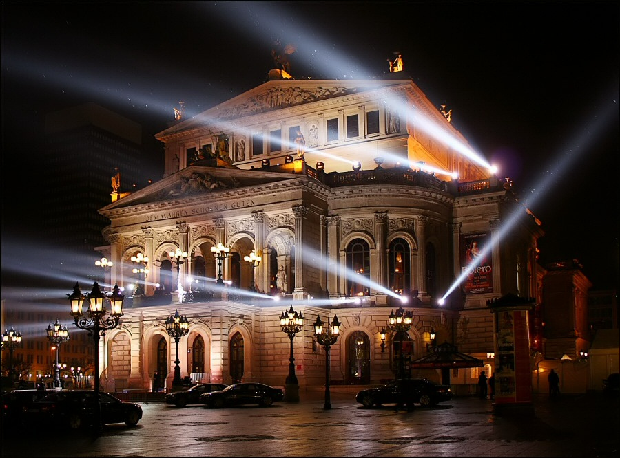 Alte Oper Frankfurt aufgenommen während des Deutschen Opernballs im Feb'2005